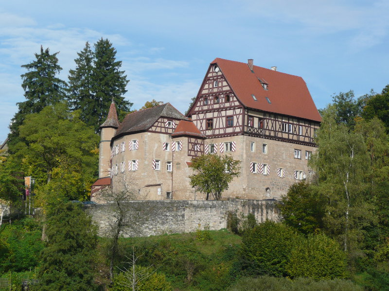 Schloss Rechenberg in Baden-Württemberg, now a youth hostel